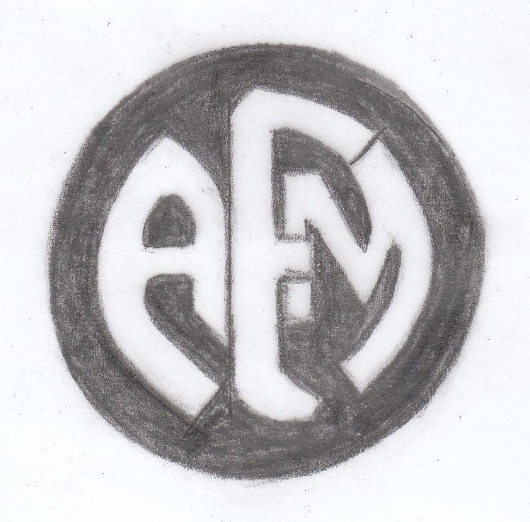 historisches Logo des früheren Club Amicale Française Mexique